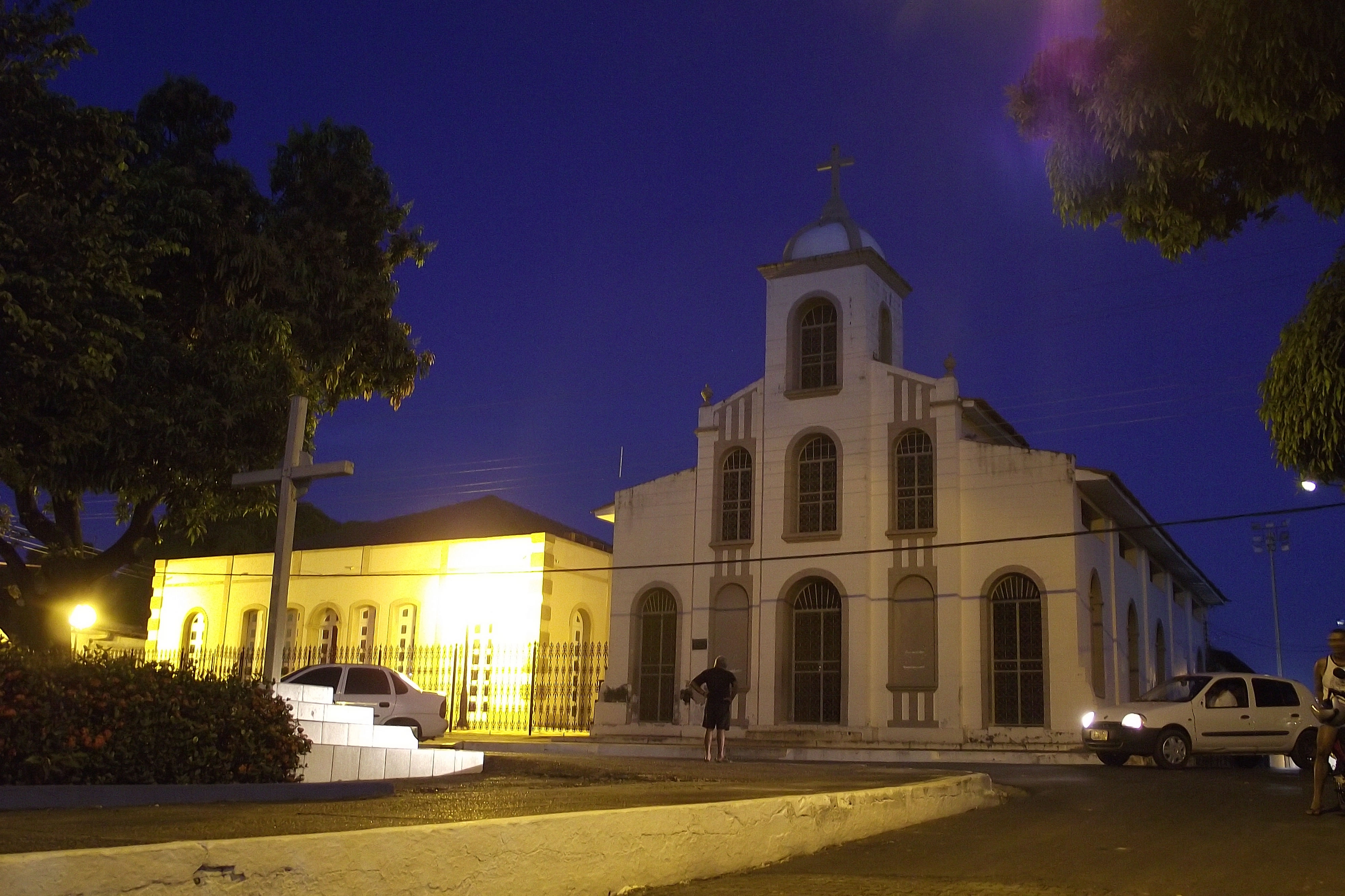 Igreja de São Félix de Valois, Cidade Velha, Marabá Pará.